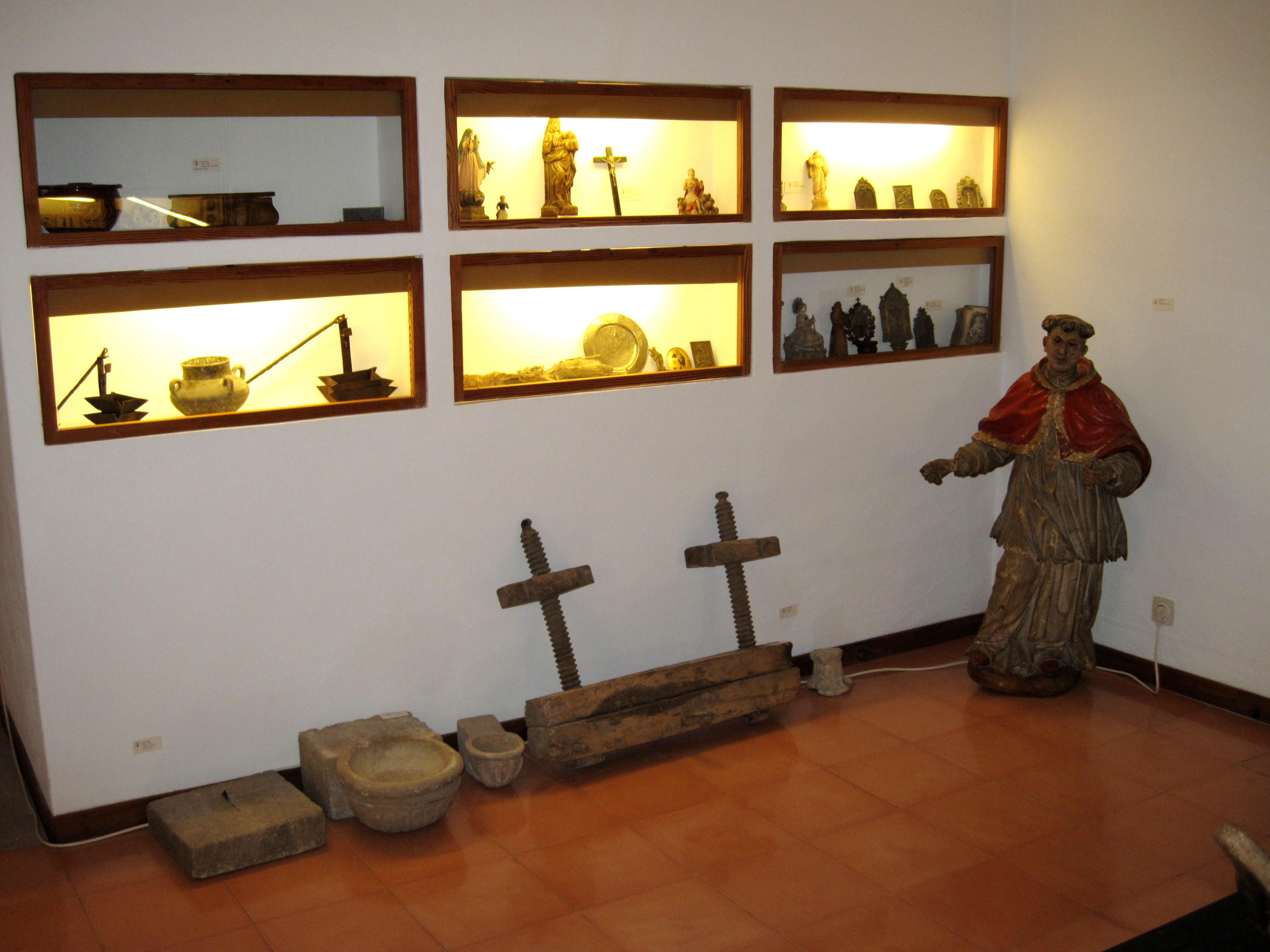 Raum der ethnologischen Sammlung im Regionalmuseum von Artà (Museu Regional d’Artà), Gemeinde Artà, Mallorca, Spanien